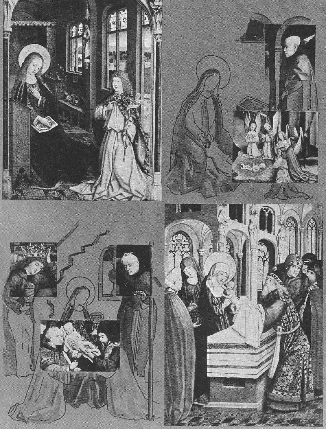 Rekonstrution des Liesborner Altars nach Pieper, linker Teil